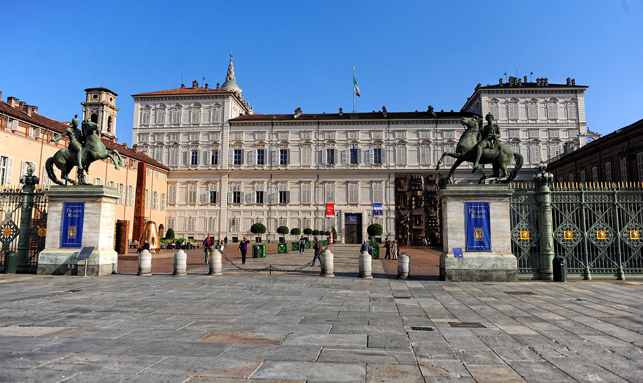 Torino Piazza Castello 2012